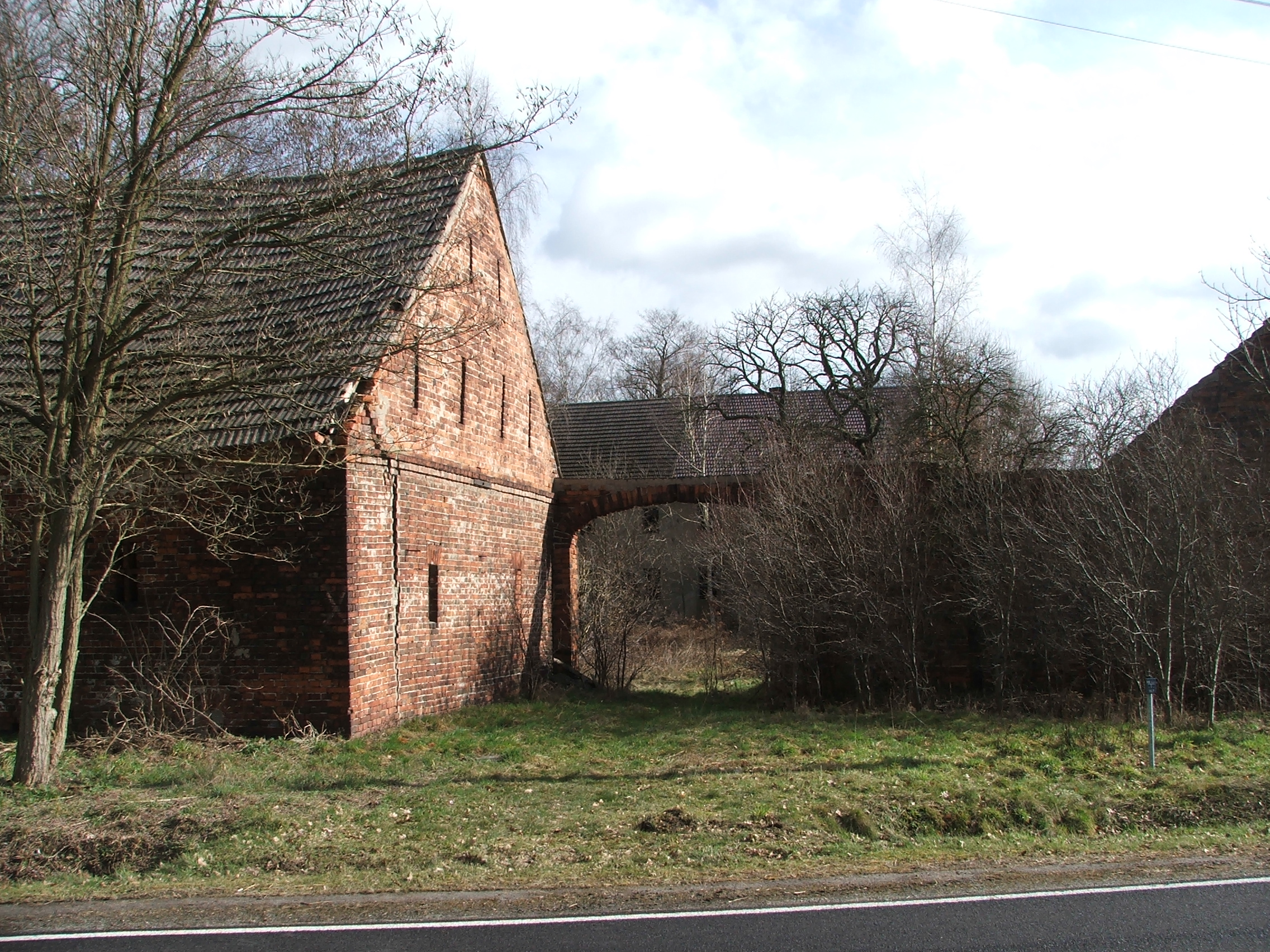 alte Wassermühle in Nexdorf